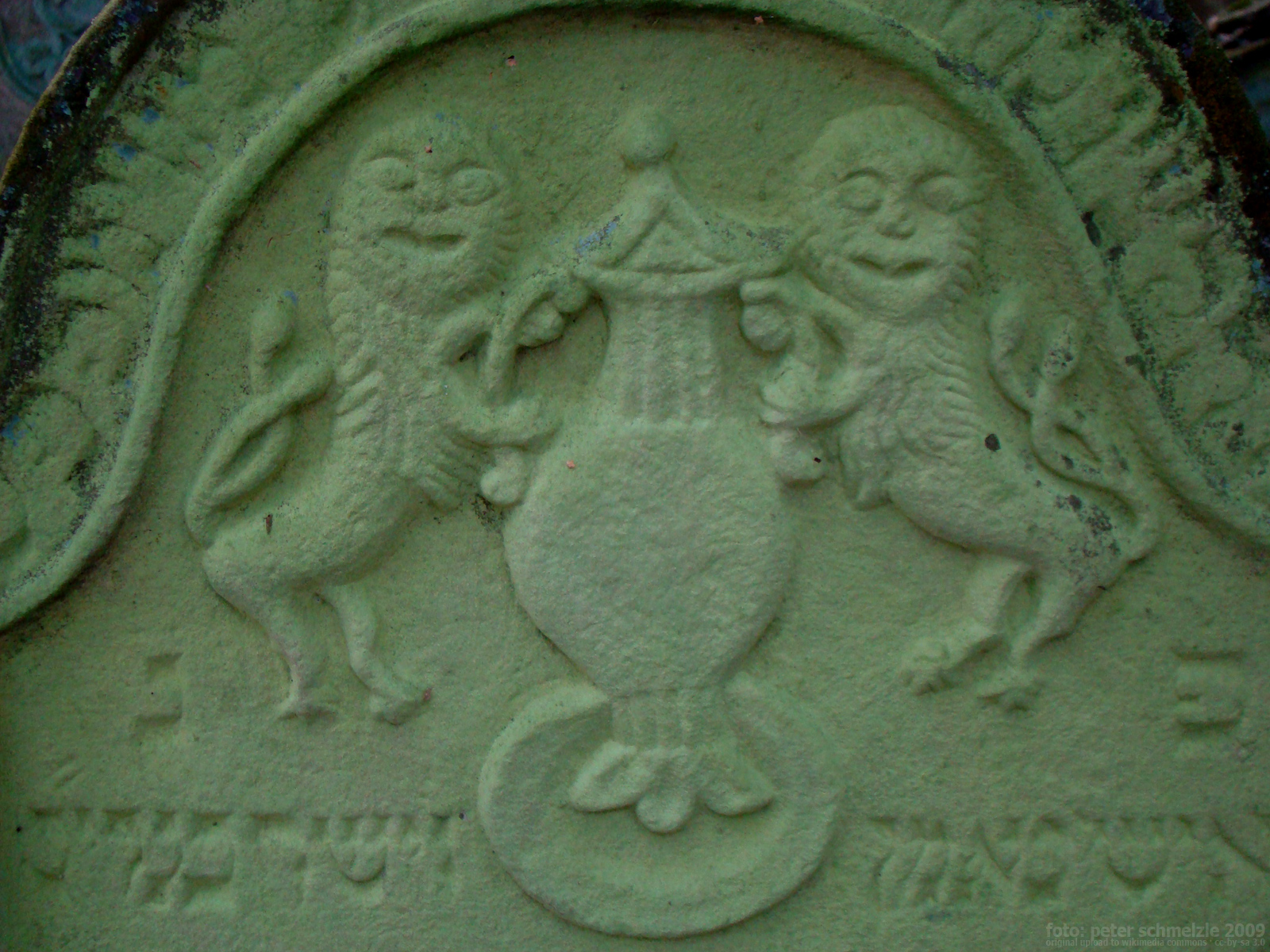 Judenfriedhof in Bad Rappenau-Heinsheim